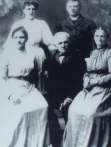 Tomáš Krýza s rodinou